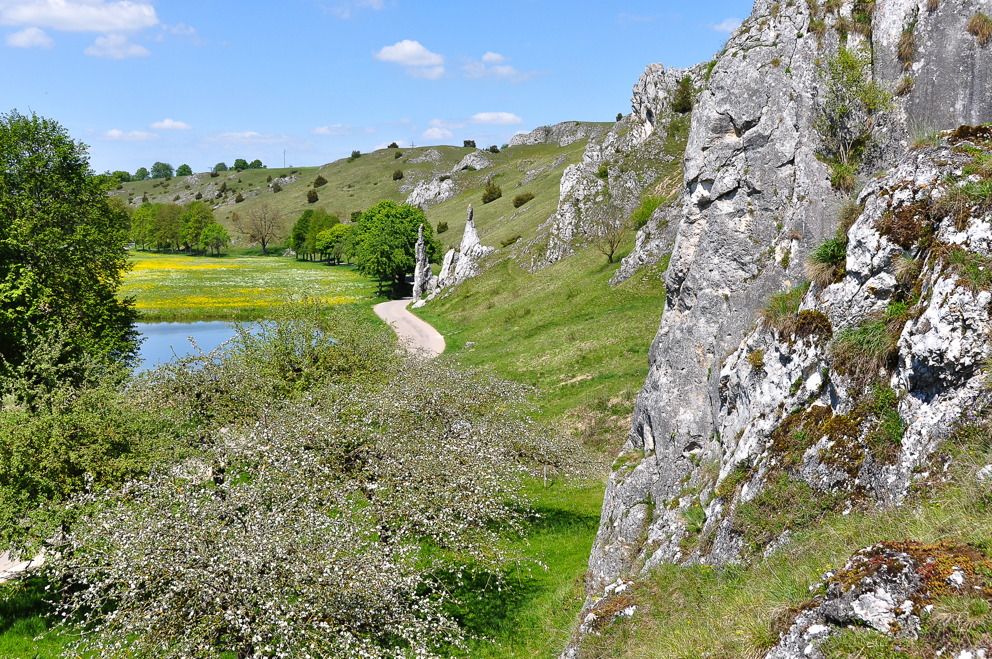 Frühling im NSG 1.114 Eselsburger Tal